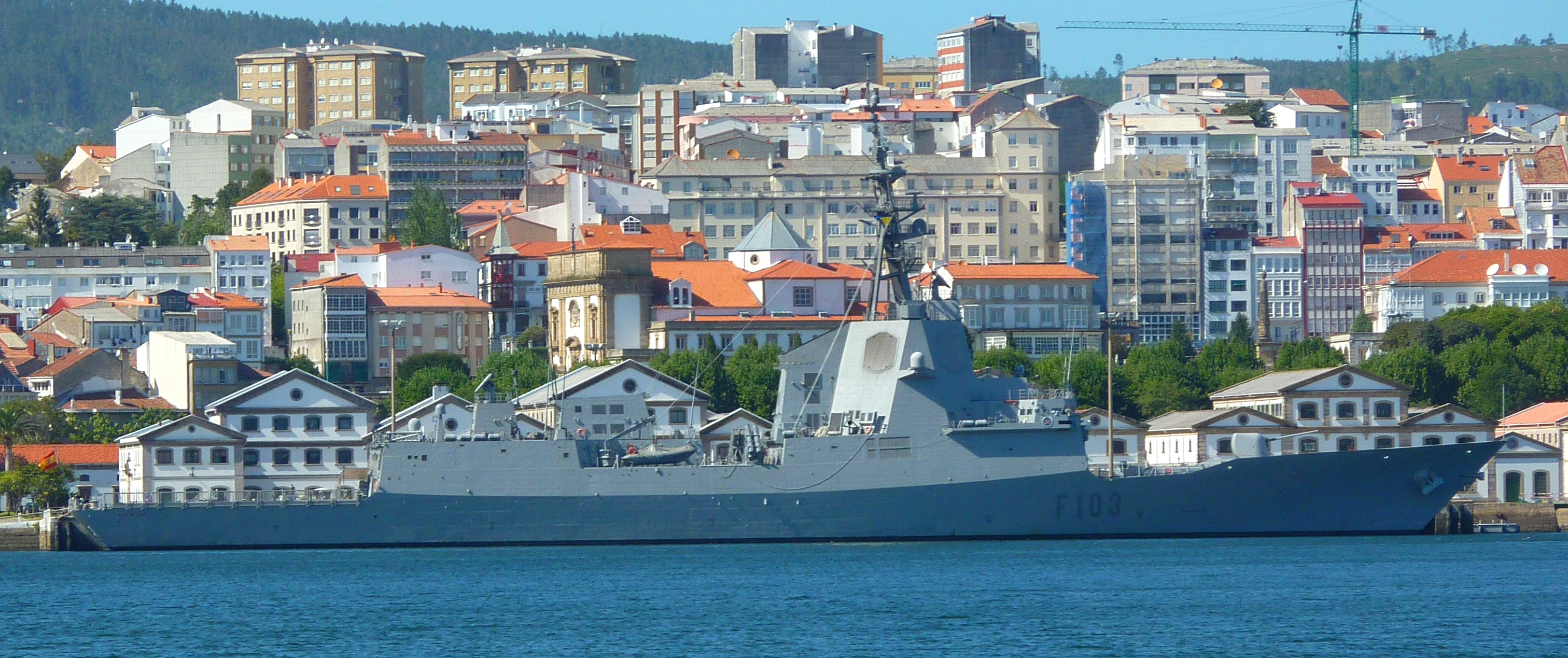 Fragata de la Armada Española clase Álvaro de Bazán "Blas de Lezo" (F-103). Atracada en el Arsenal militar de Ferrol